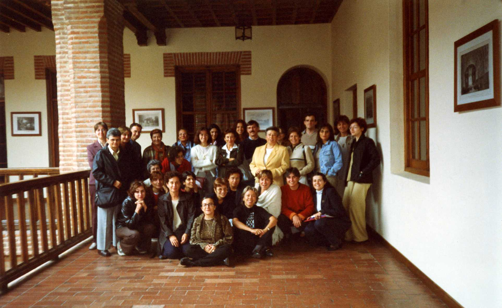 VII Encontro de Centros de Documentación e Bibliotecas de Mulleres (Valladolid, 2000)